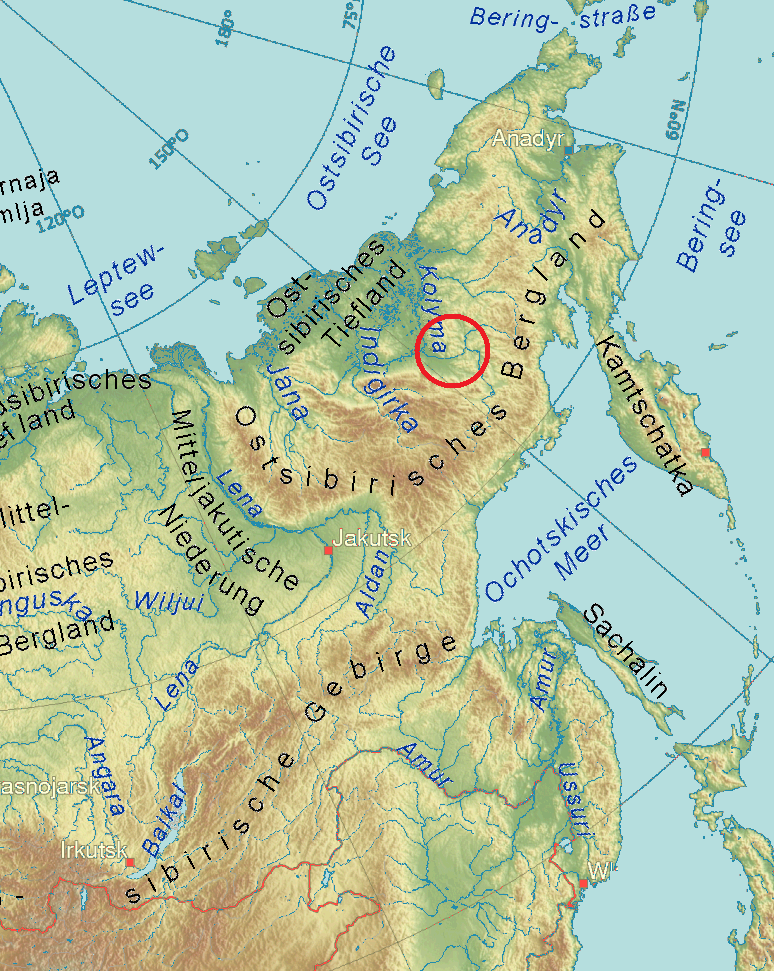 Geografisk position av Sydjukagiriska.